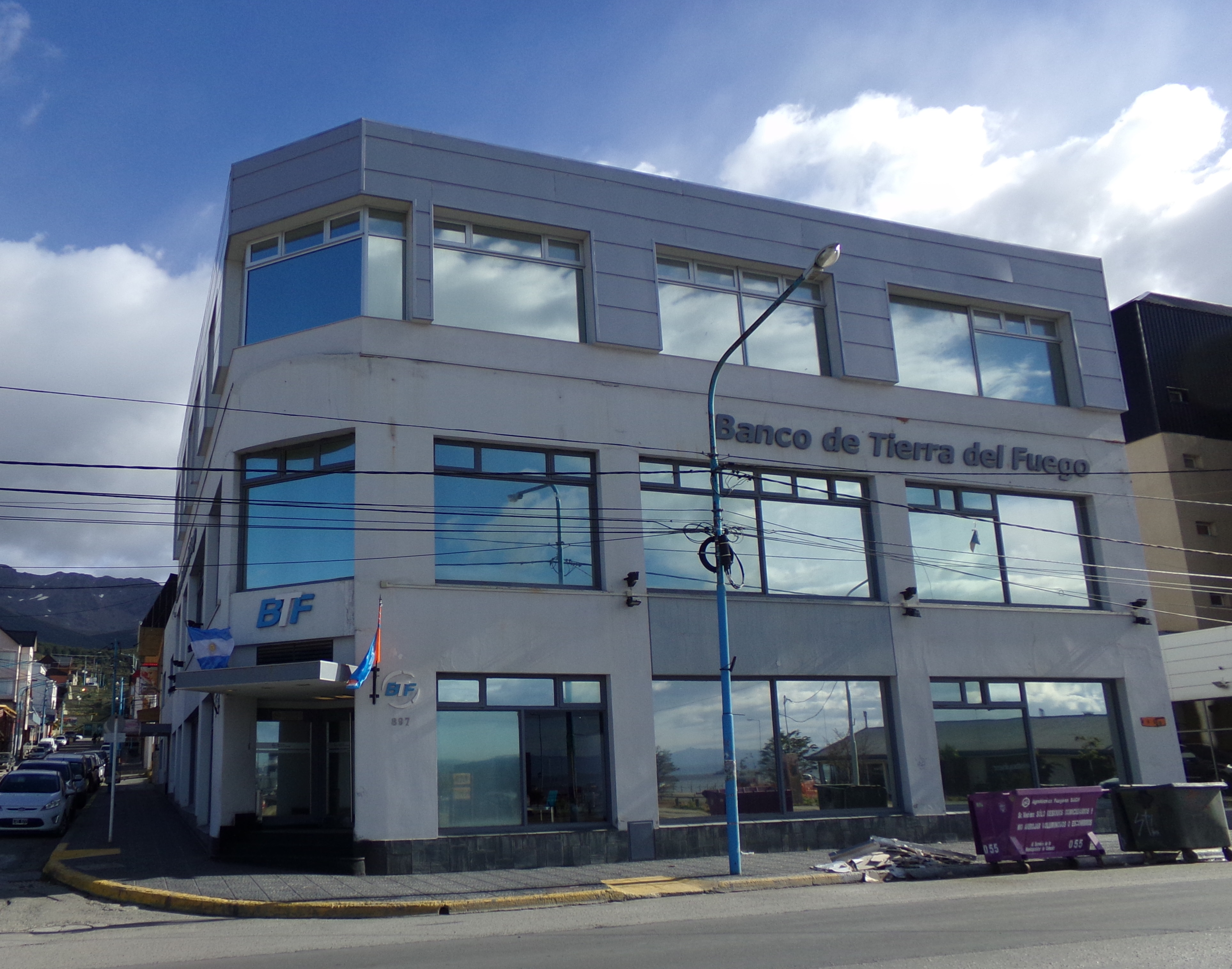 Sede Central - Banco Tierra del Fuego - Ushuaia